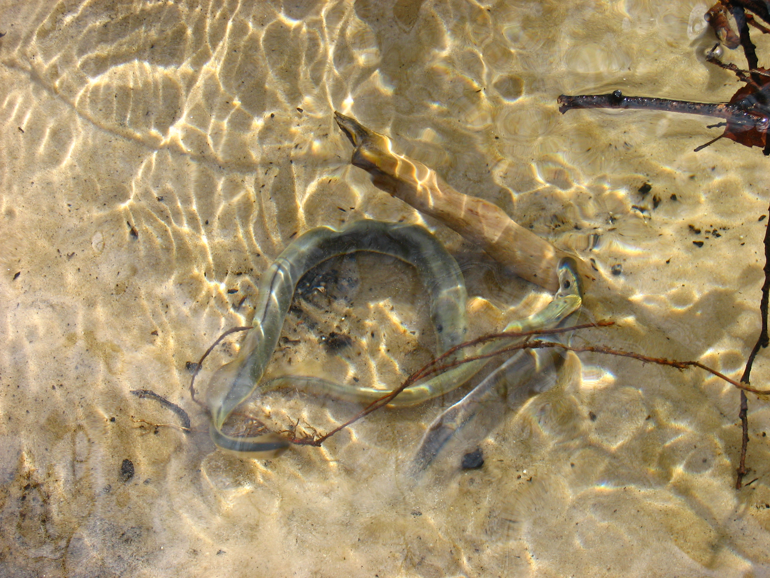 Шлюбні ігри міноги української (Eudontomyzon mariae) з національного парку "Святі Гори"